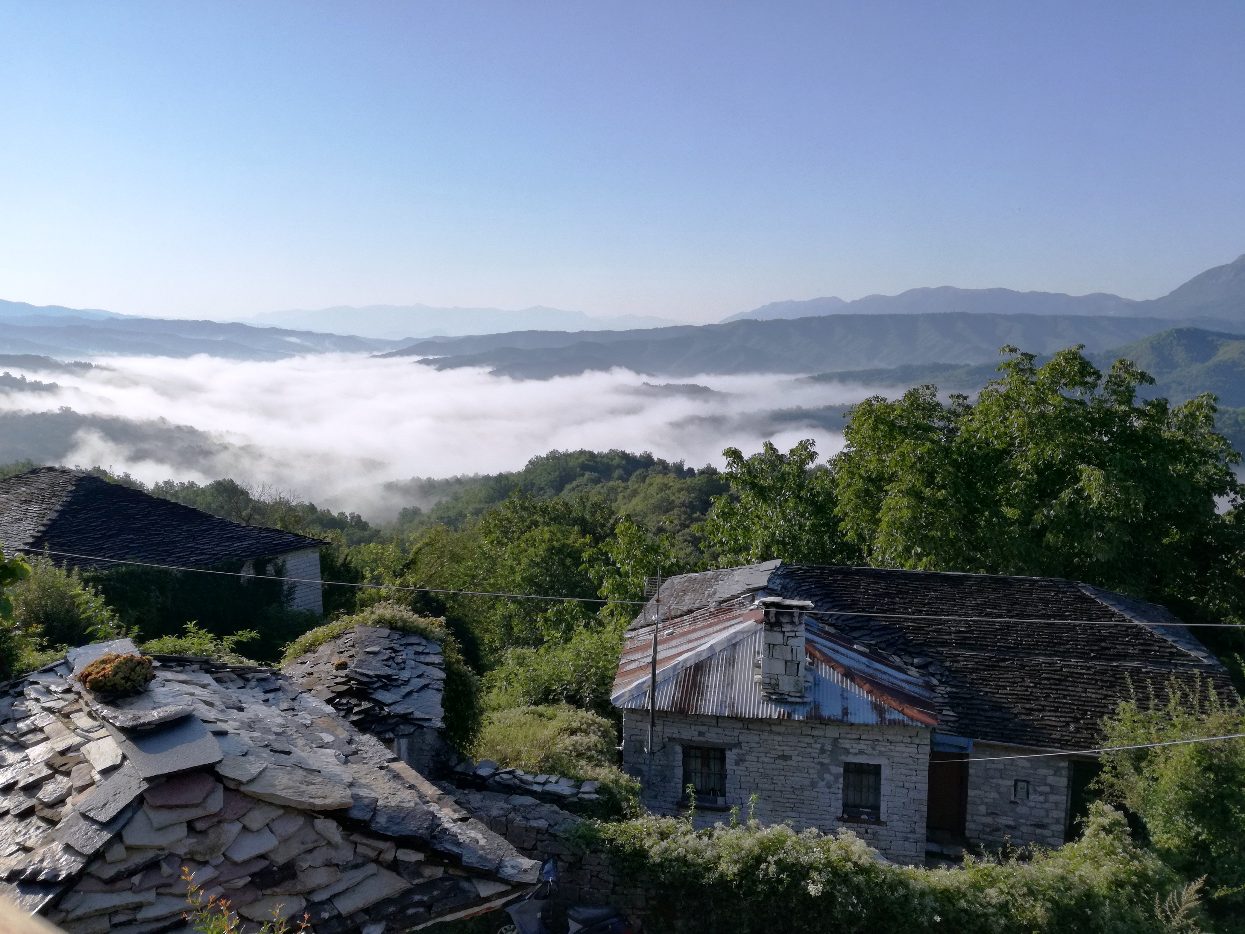 Βίτσα Ζαγορίου«Βίτσα Ζαγορίου»